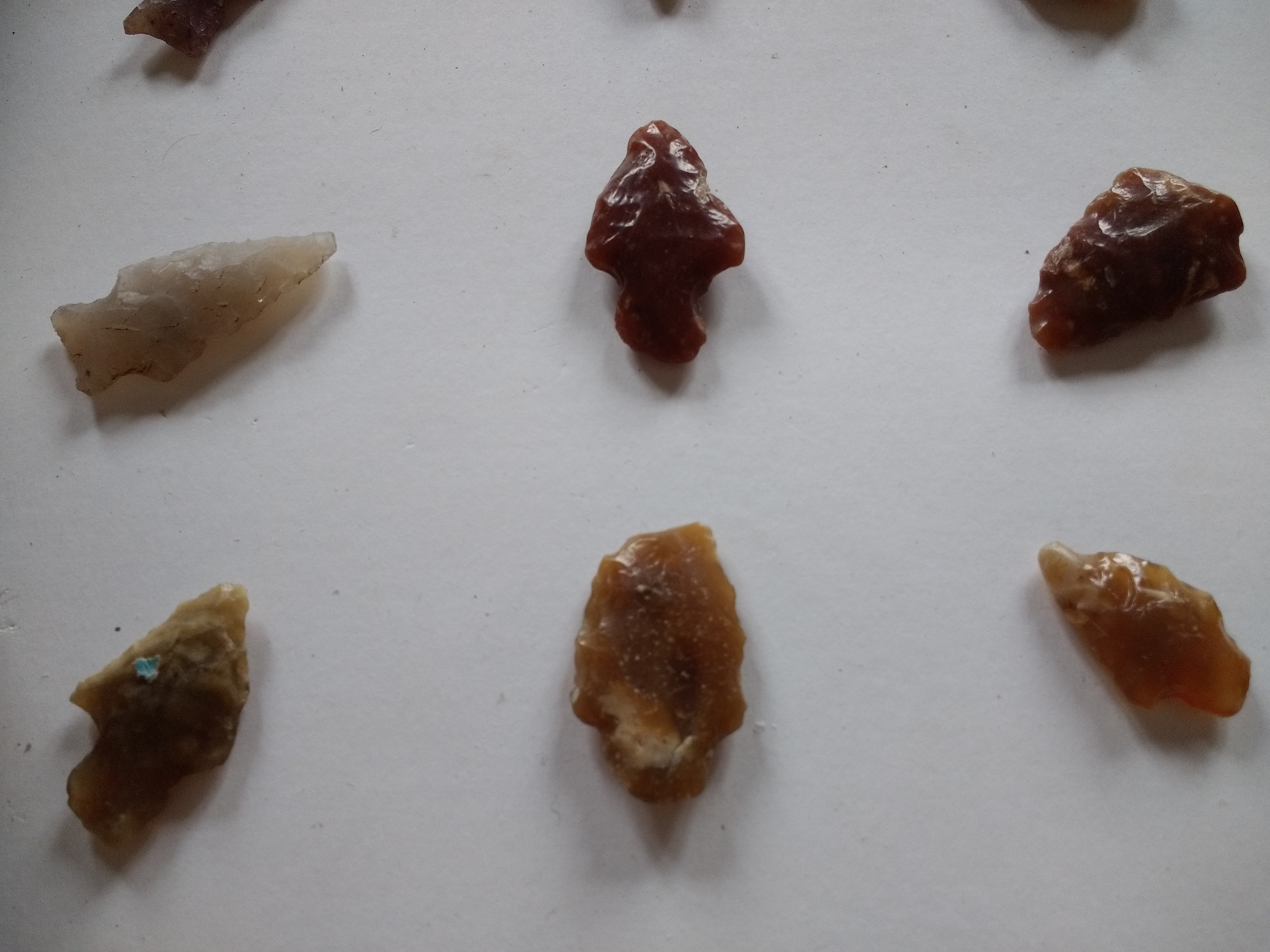 Puntas de flechas en el Museo Indígena de Colonia del Sacramento, encontradas en zona de "El Calabrés", Colonia.